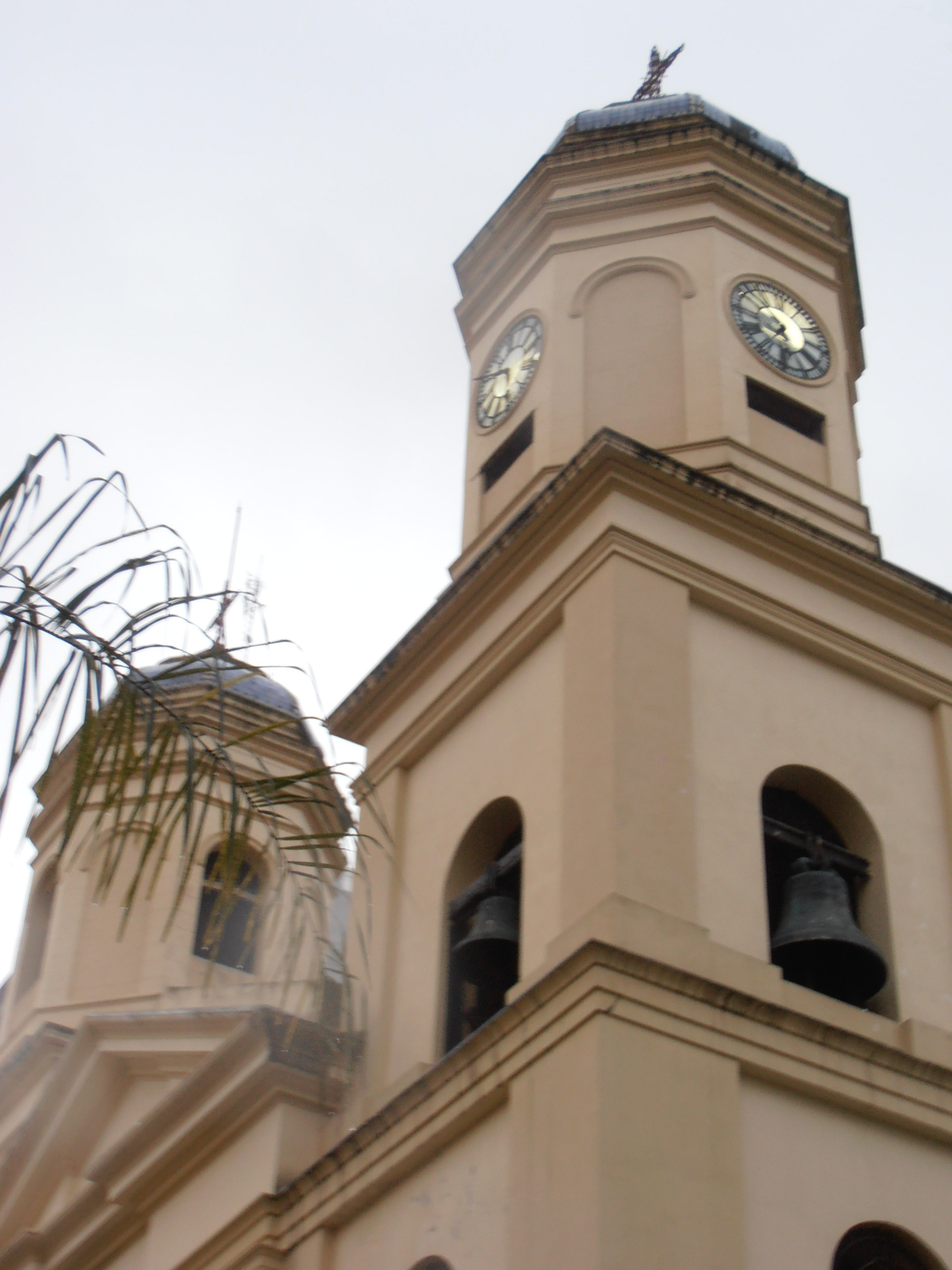 Iglesia Parroquial de la Inmaculada Concepción